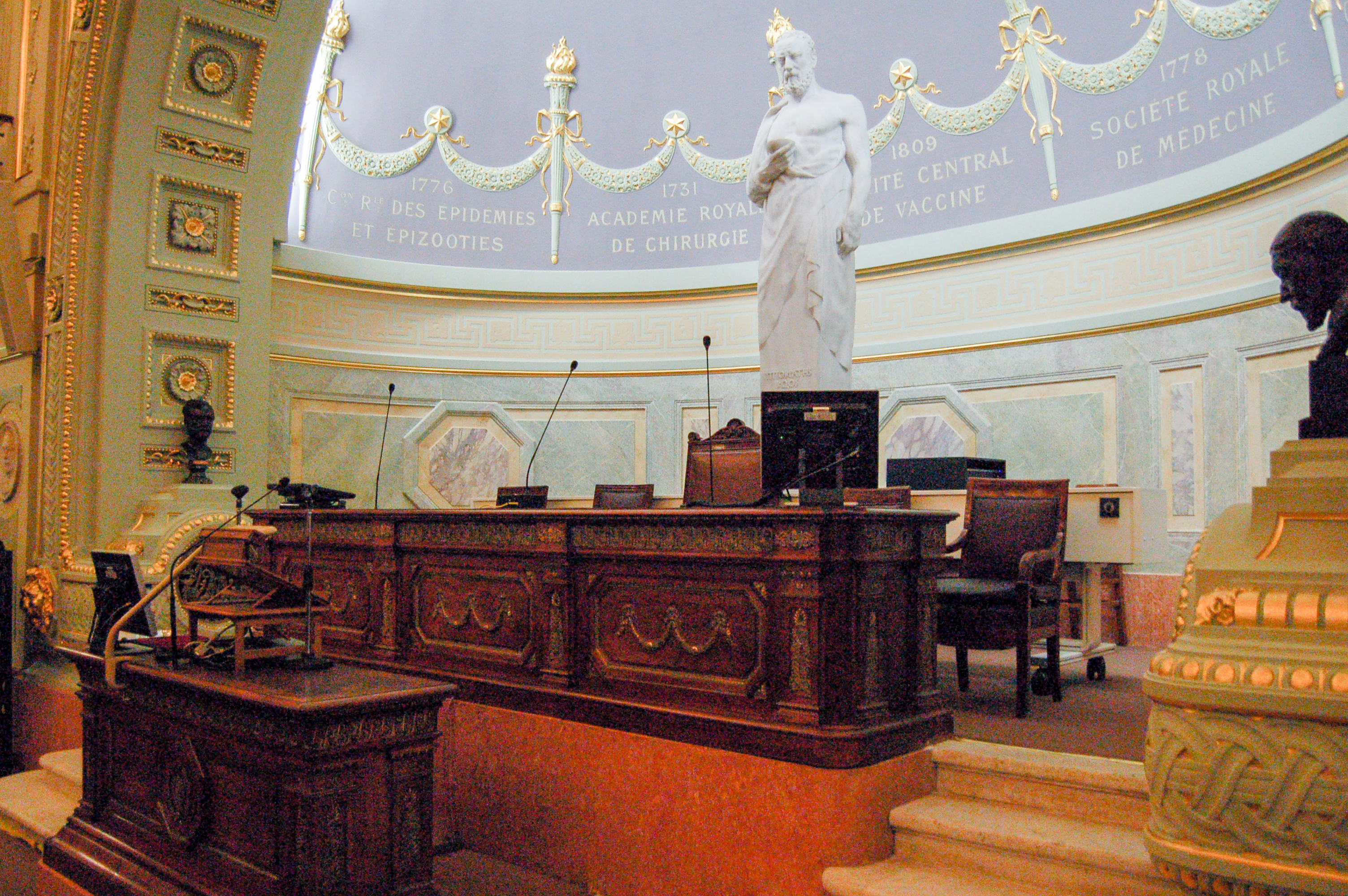 Pupitre de la Chambre de l'Académie nationale de Médecine, Paris, France